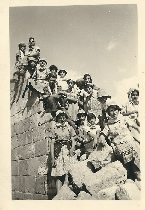 בנות שירות עזראיות מתנדבות בישובים